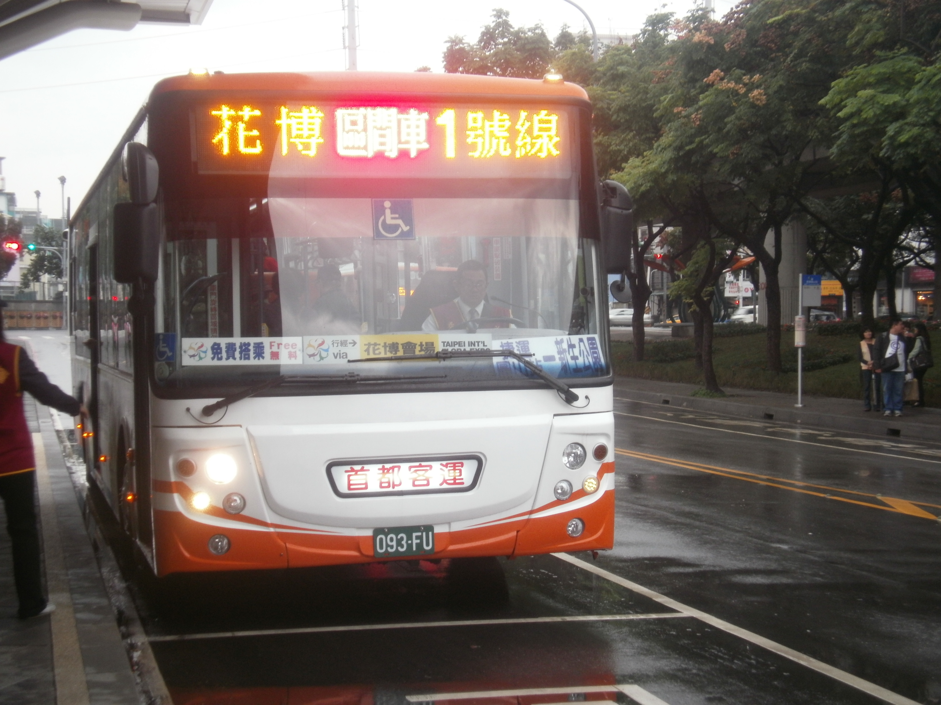 花博1號線區間車(捷運圓山站~新生公園)